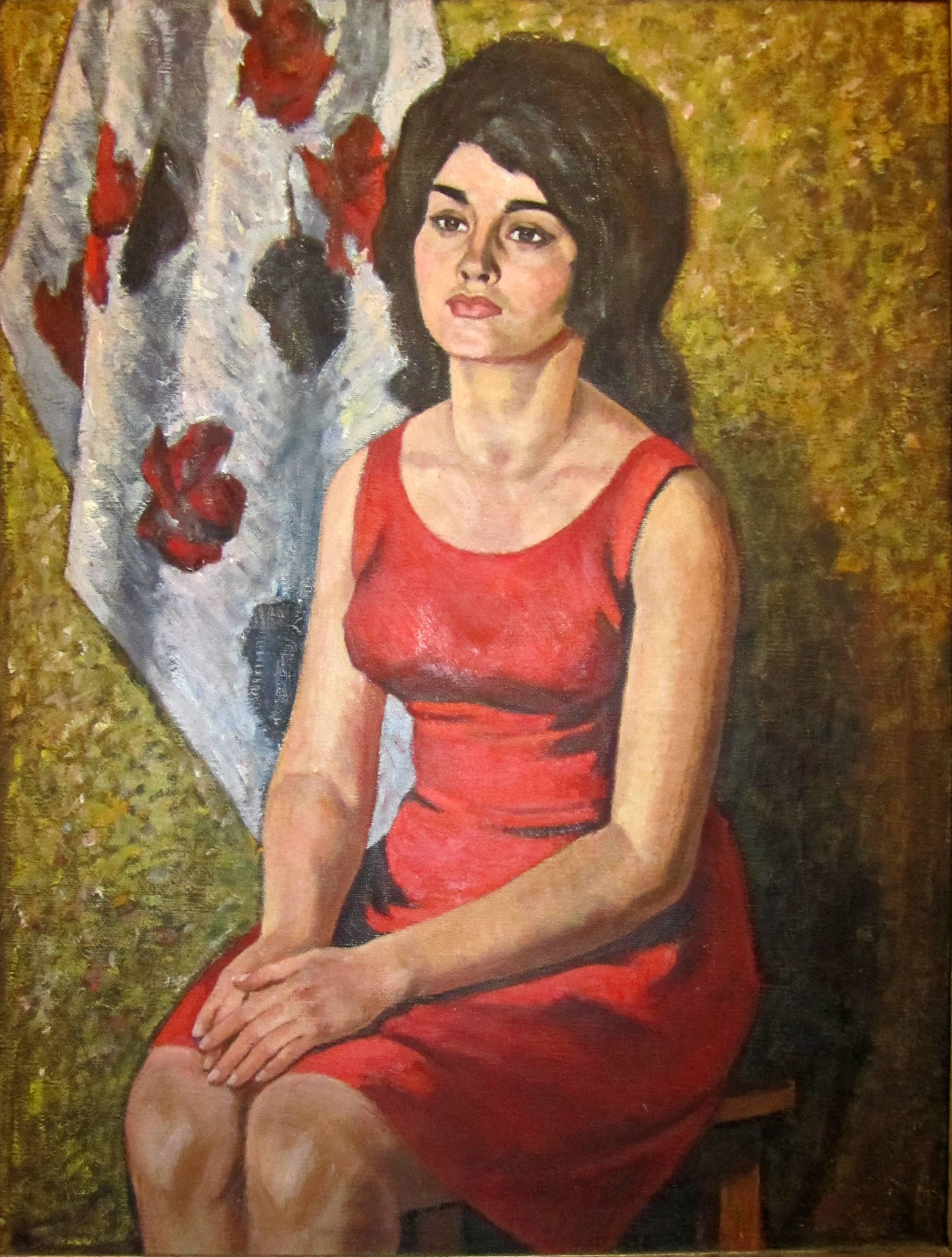 Портрет украинского художника Г.И. Бельцова "Таня". Написан в 1970 году в Одессе.